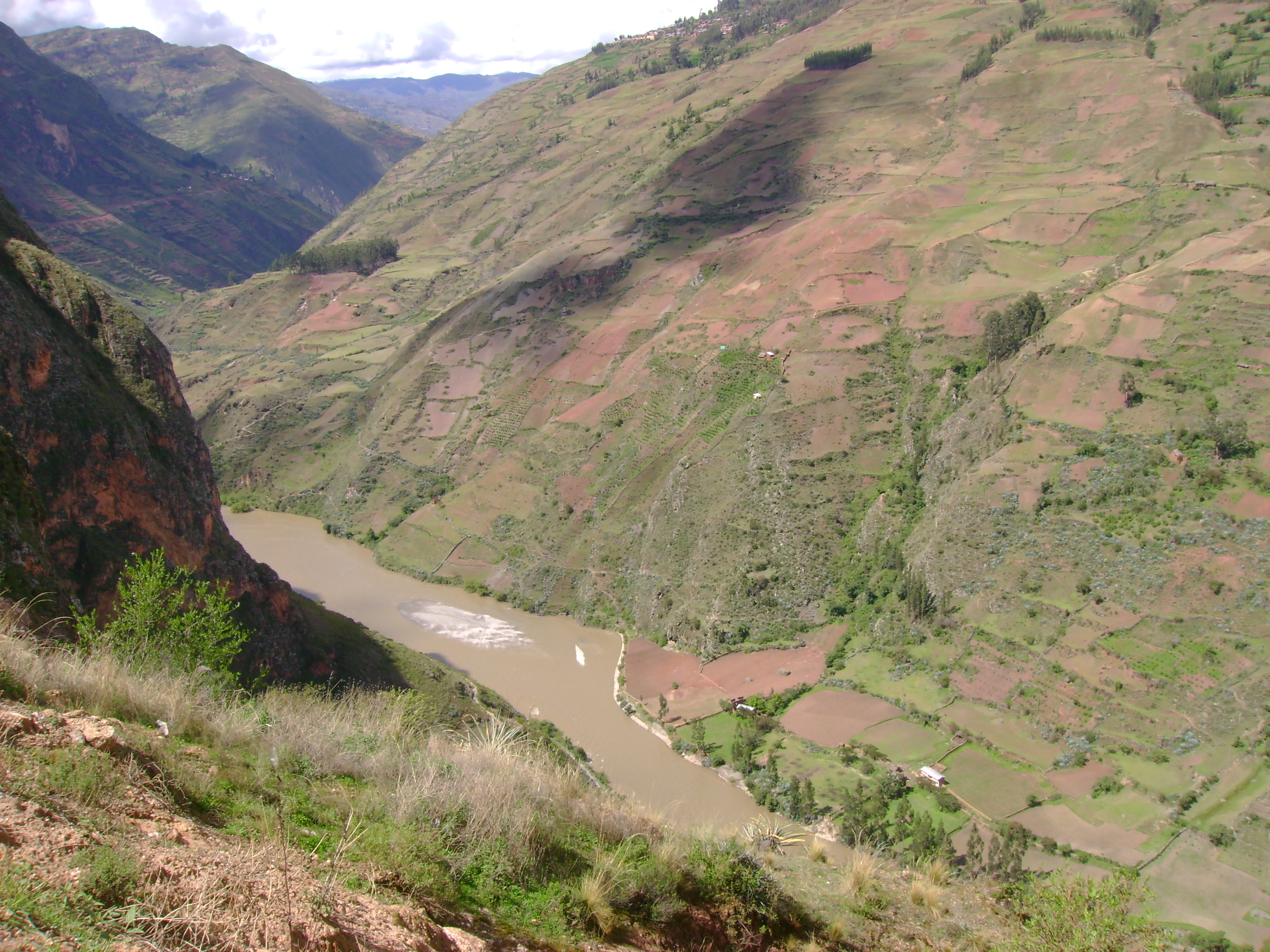 Río Marañón visto desde cerca del tunel.